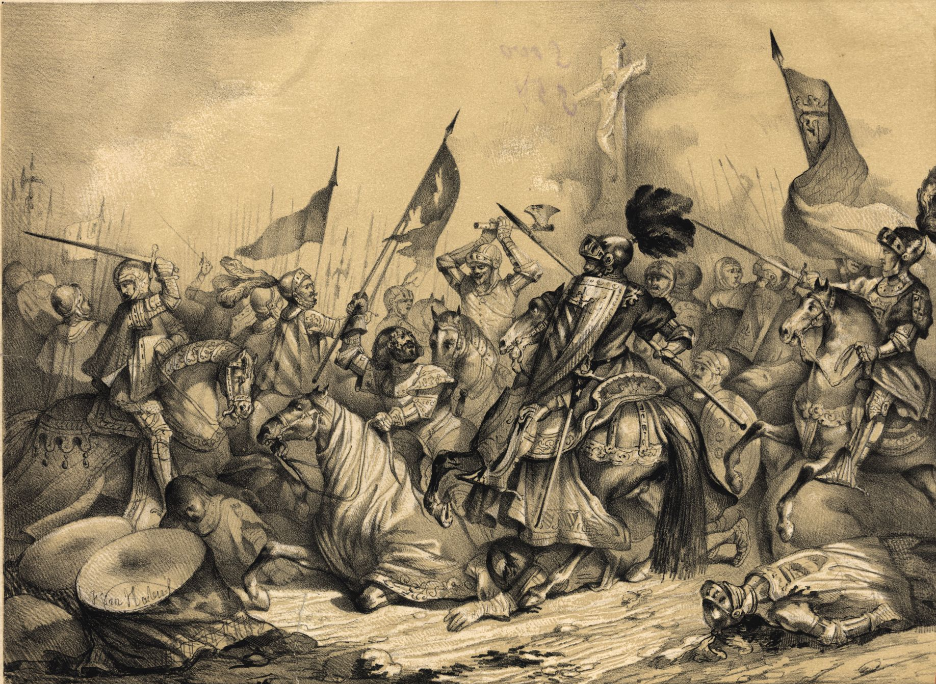 Batalla de Toro.